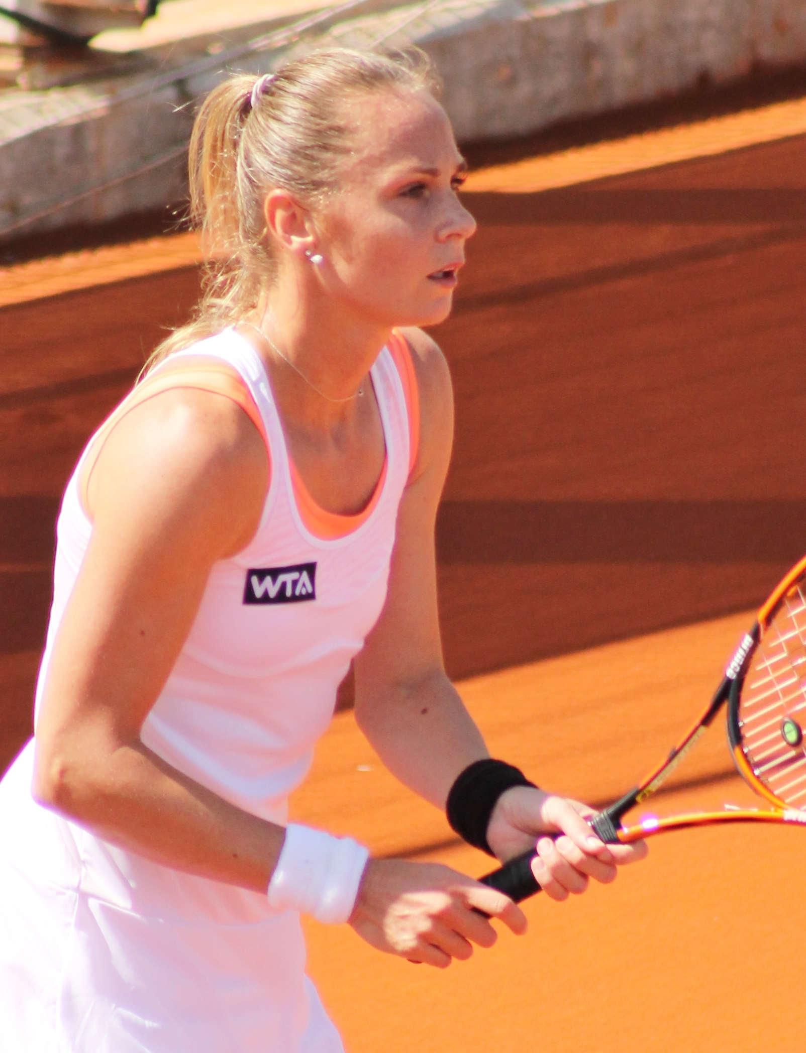 Rybarikova MA14 (1) - Copy